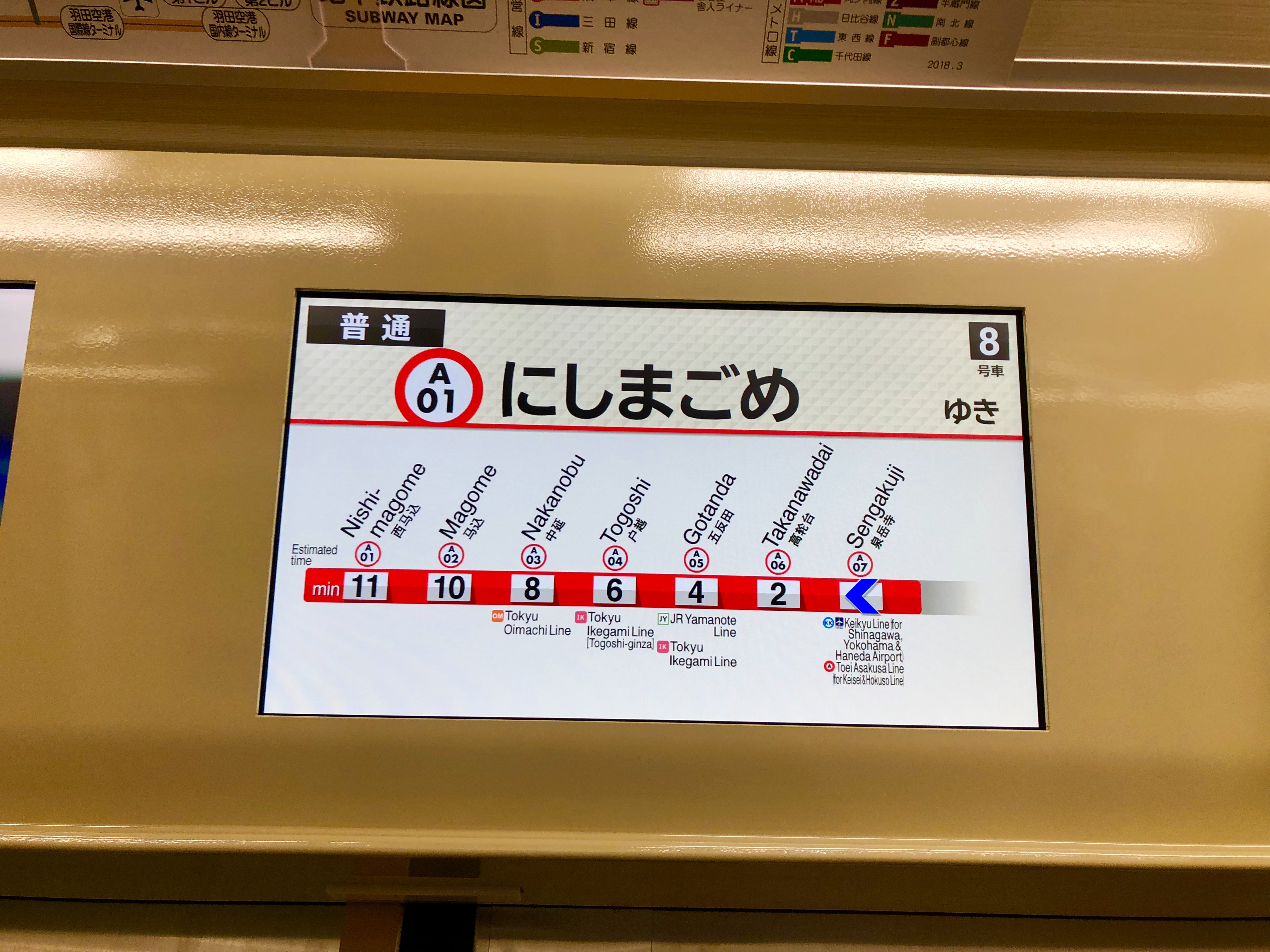 都営5500形